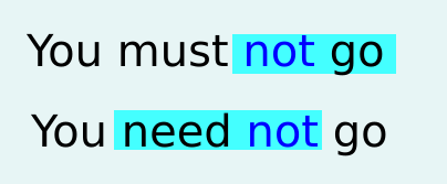 Mustn't vs needn't